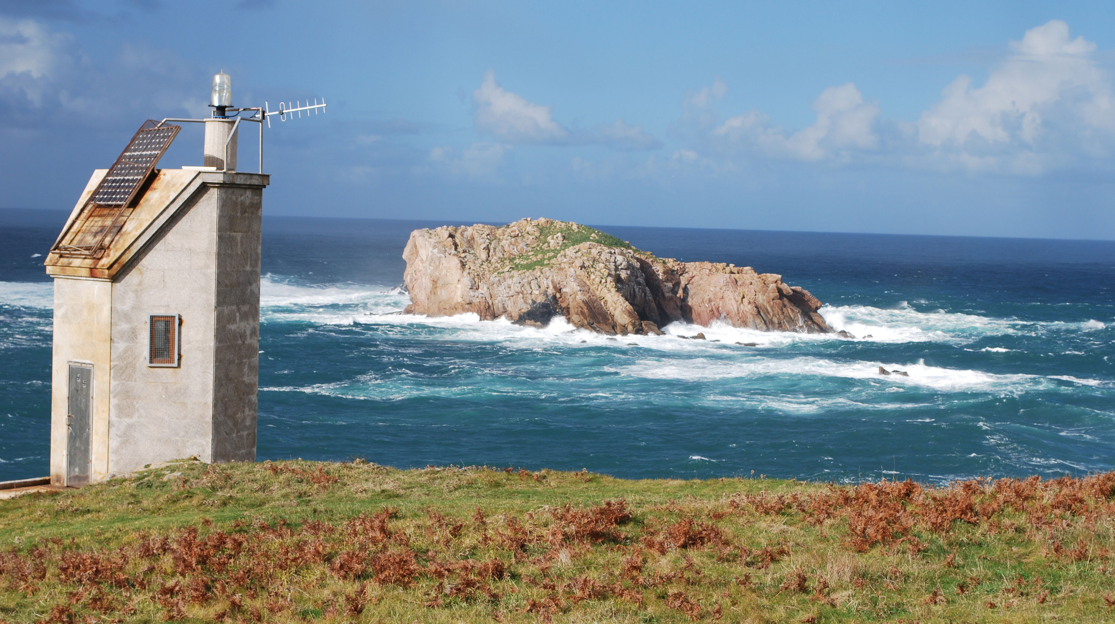 Faro de Lobadiz e illas Gabeiras dende o Castro de Lobadiz Ferrol A Coruña Galiza Spain